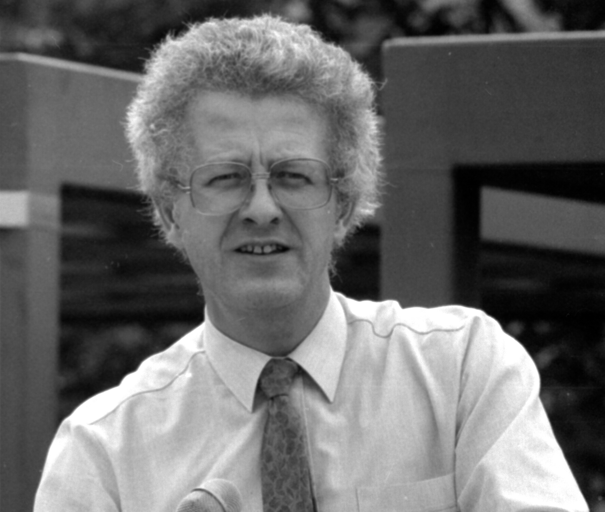 Verstaltung des DGB am 31. August 1985 in Mainz auf dem Rathaus Vorplatz